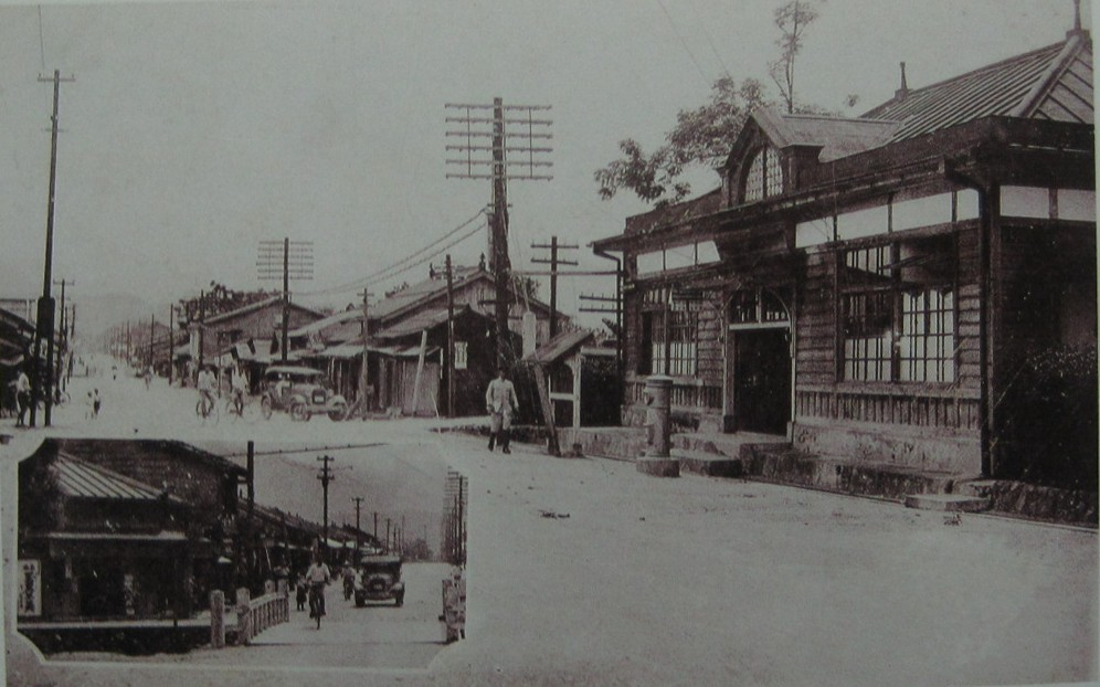 日治時期玉里街街景